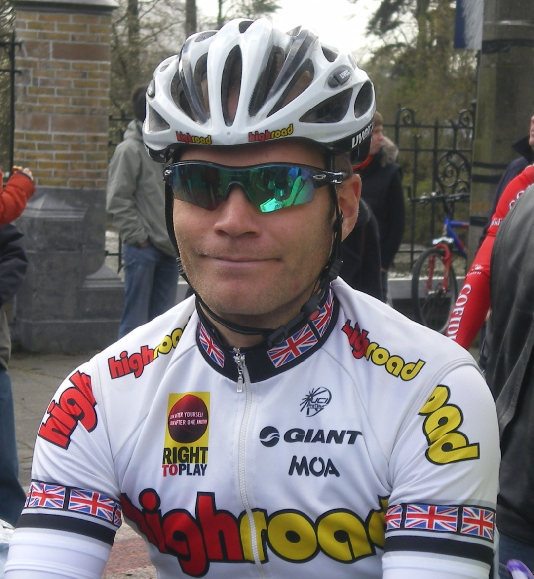 Roger Hammond - Omloop Het Volk 2008 (Gand / Gent)